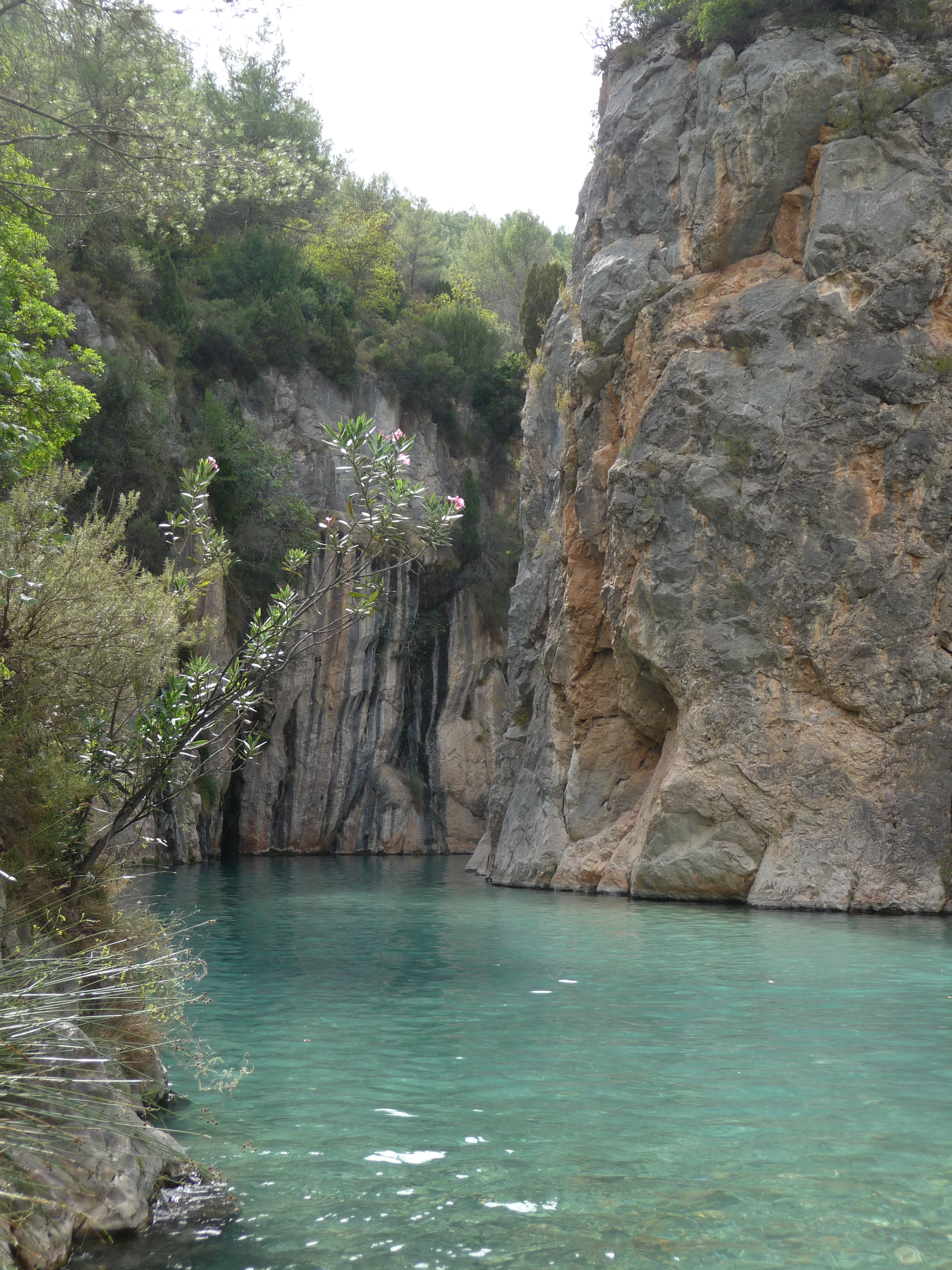 Curso alto del Mijares en Montanejos This is a photography of a Site of Community Importance in Spain with the ID: ES5222004. Natura2000 entry, EEA entry